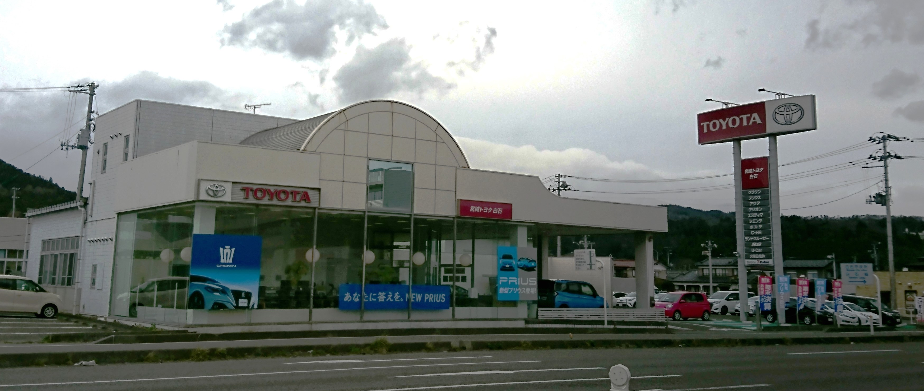 宮城トヨタ自動車 白石店（宮城県白石市） 2019年3月23日撮影